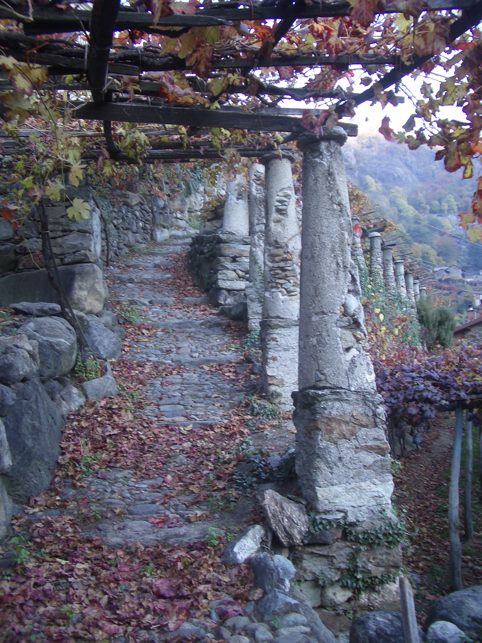 Tipical Vineyard and ”Via Francigena”, Settimo Vittone, Turin, Italy